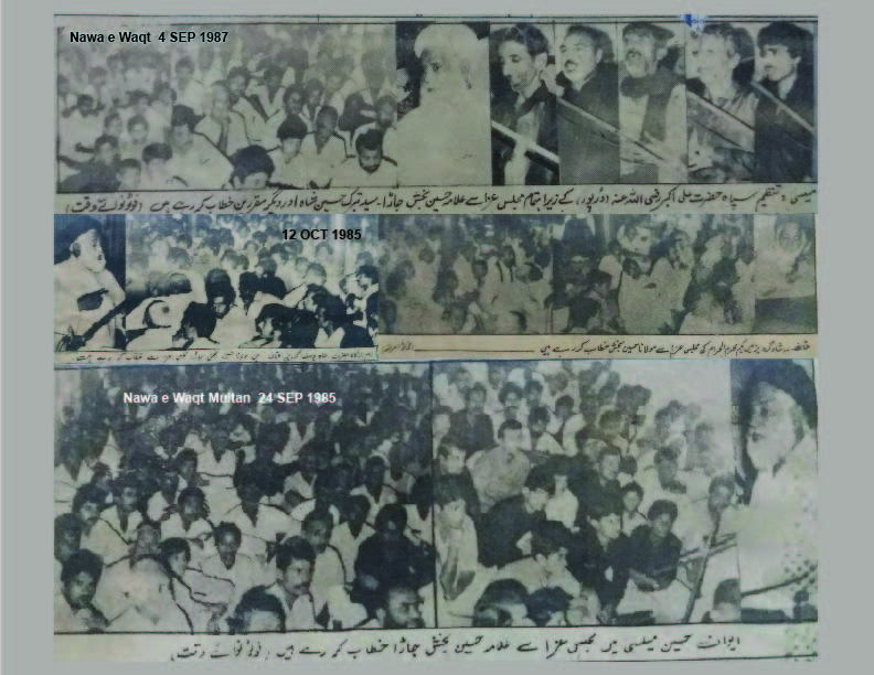 قبلہ مرحوم کی مختلف مقامات پر مجالس عزاء میں خطابت کی تصاویر